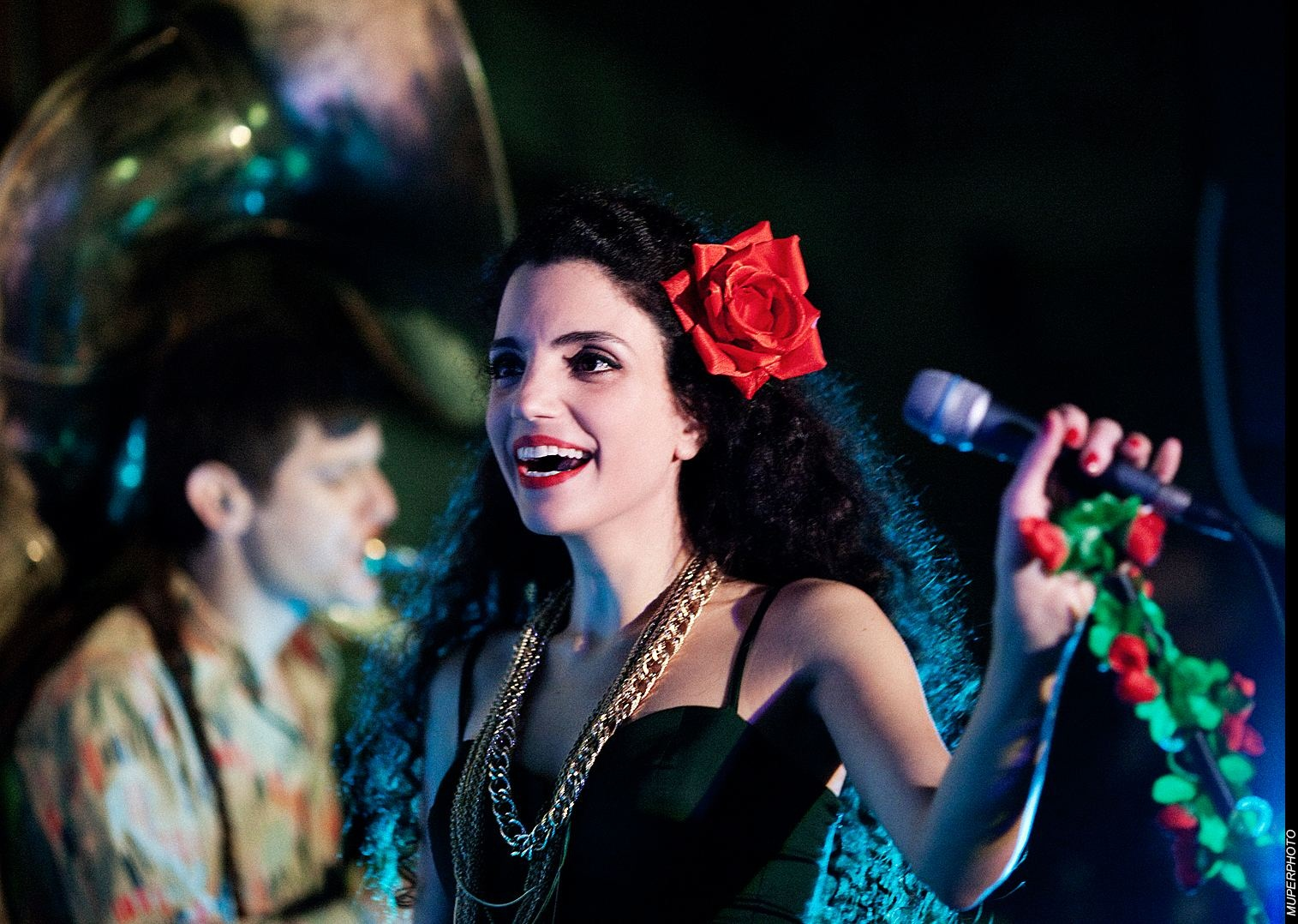 יעל בדש בהופעה ב"קונטיינר" יפו 2012